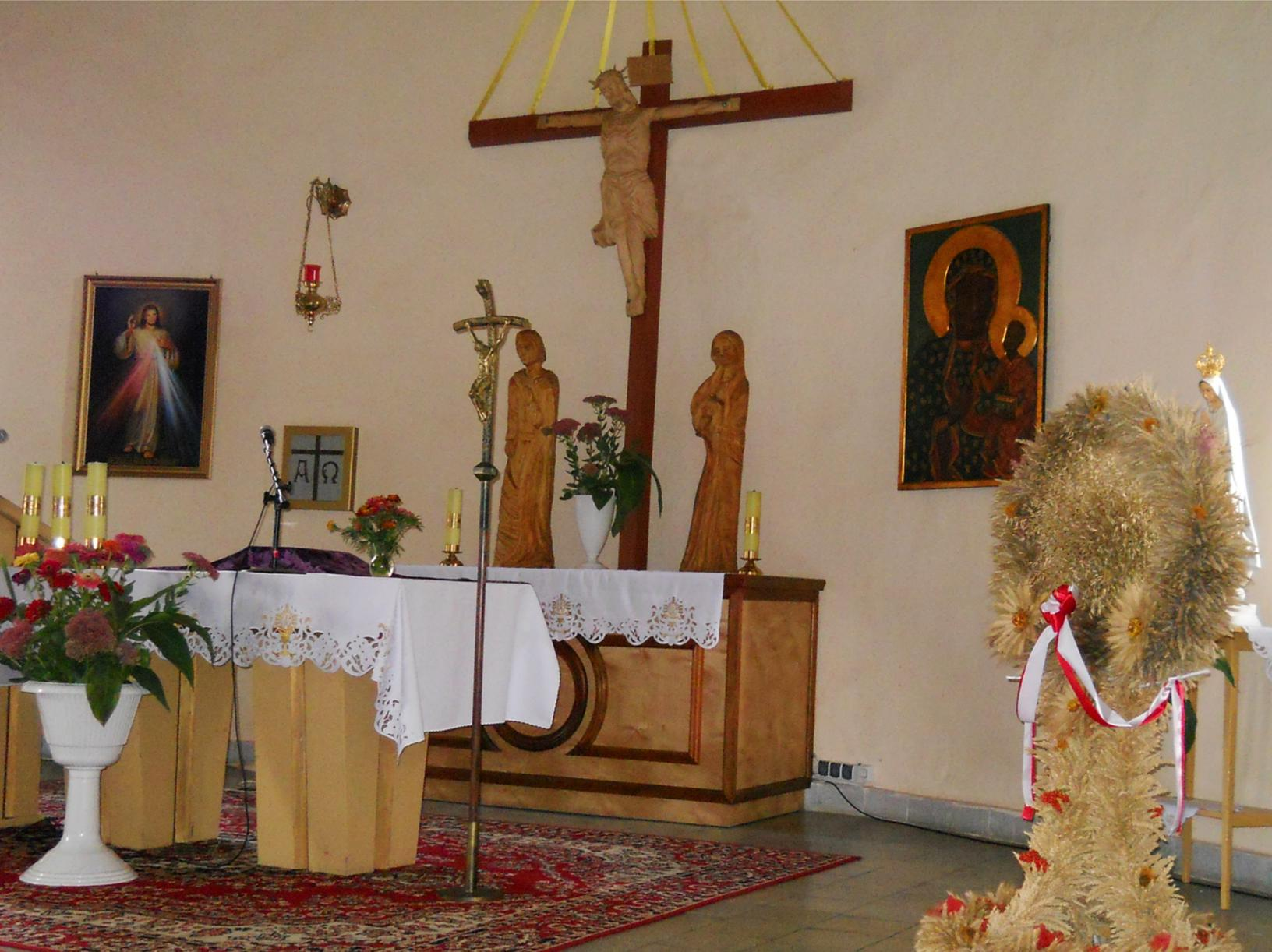 Kościół w Wojcieszycach. Ołtarz.